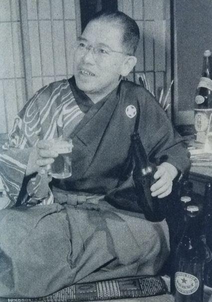 五代目一龍斎貞丈